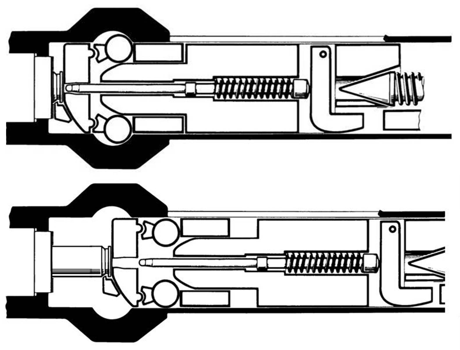 Classe du Fass 57, schémas de principe